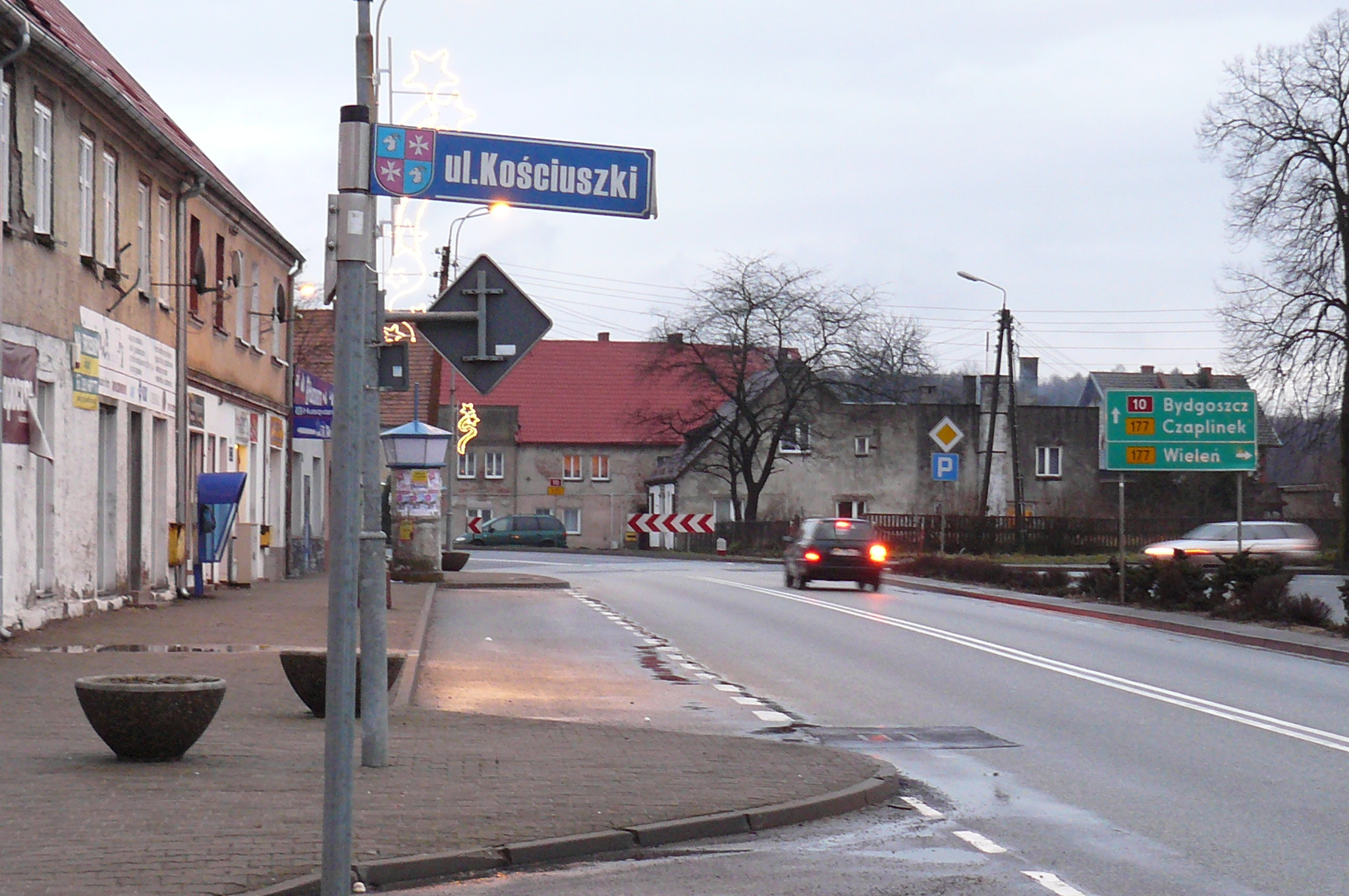 Mirosławiec, centrum.